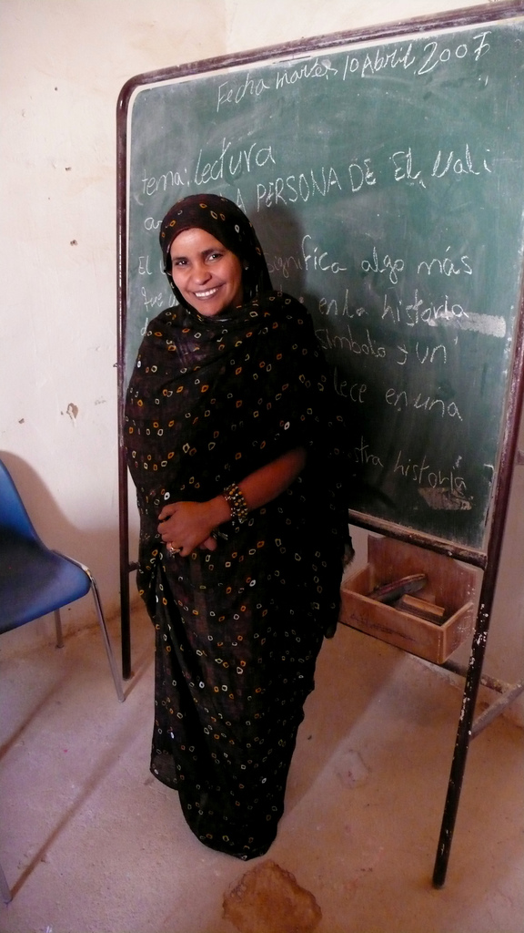 Maima Mahamud es directora de la escuela de mujeres de Dajla y representante para la secretaria de estado de los asuntos sociales y la promoción de la mujer en el campamento de Dajla.